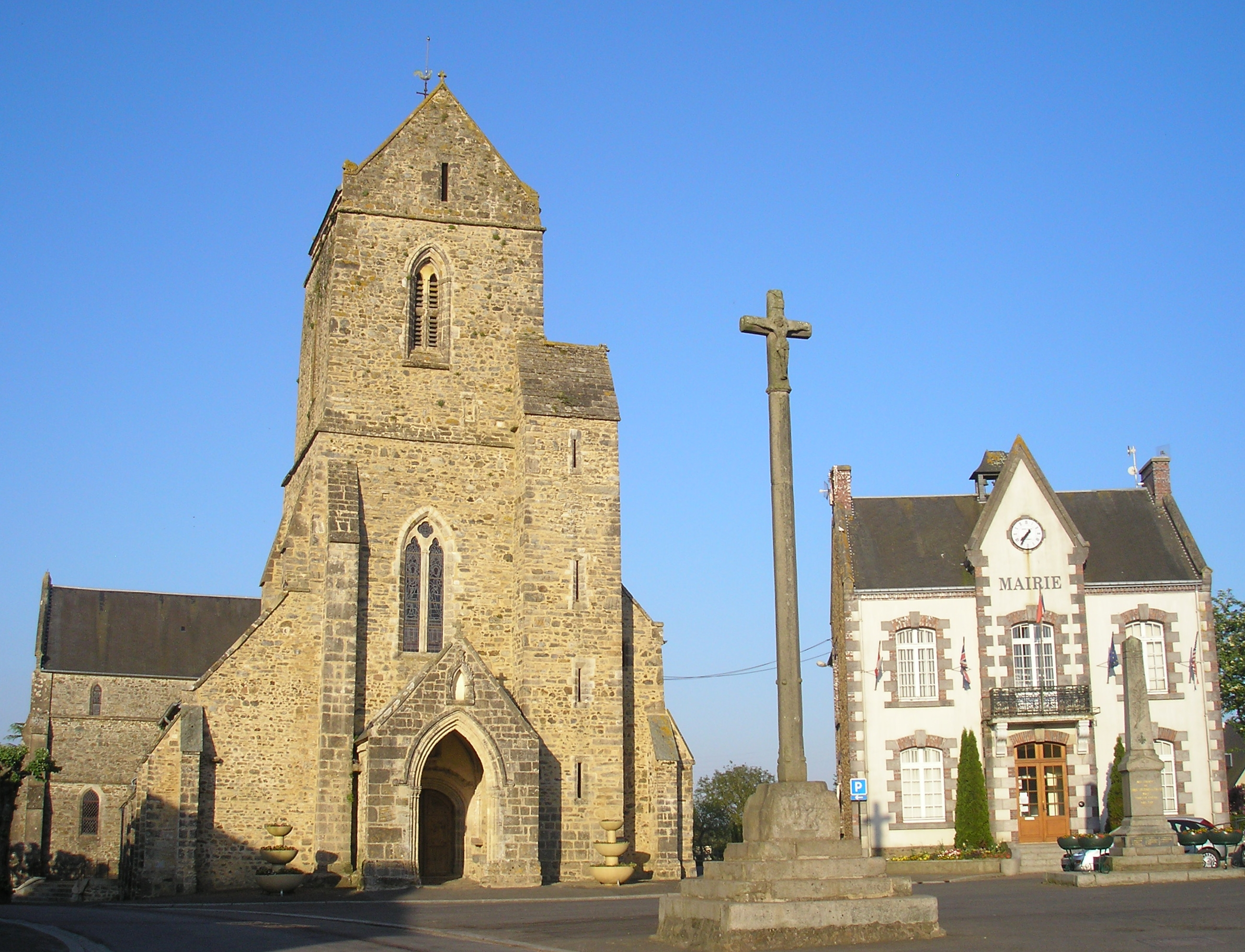 Saint-Sauveur-Lendelin (Normandie, France). L'église Saint-Laurent, la croix de 1571 et la mairie.